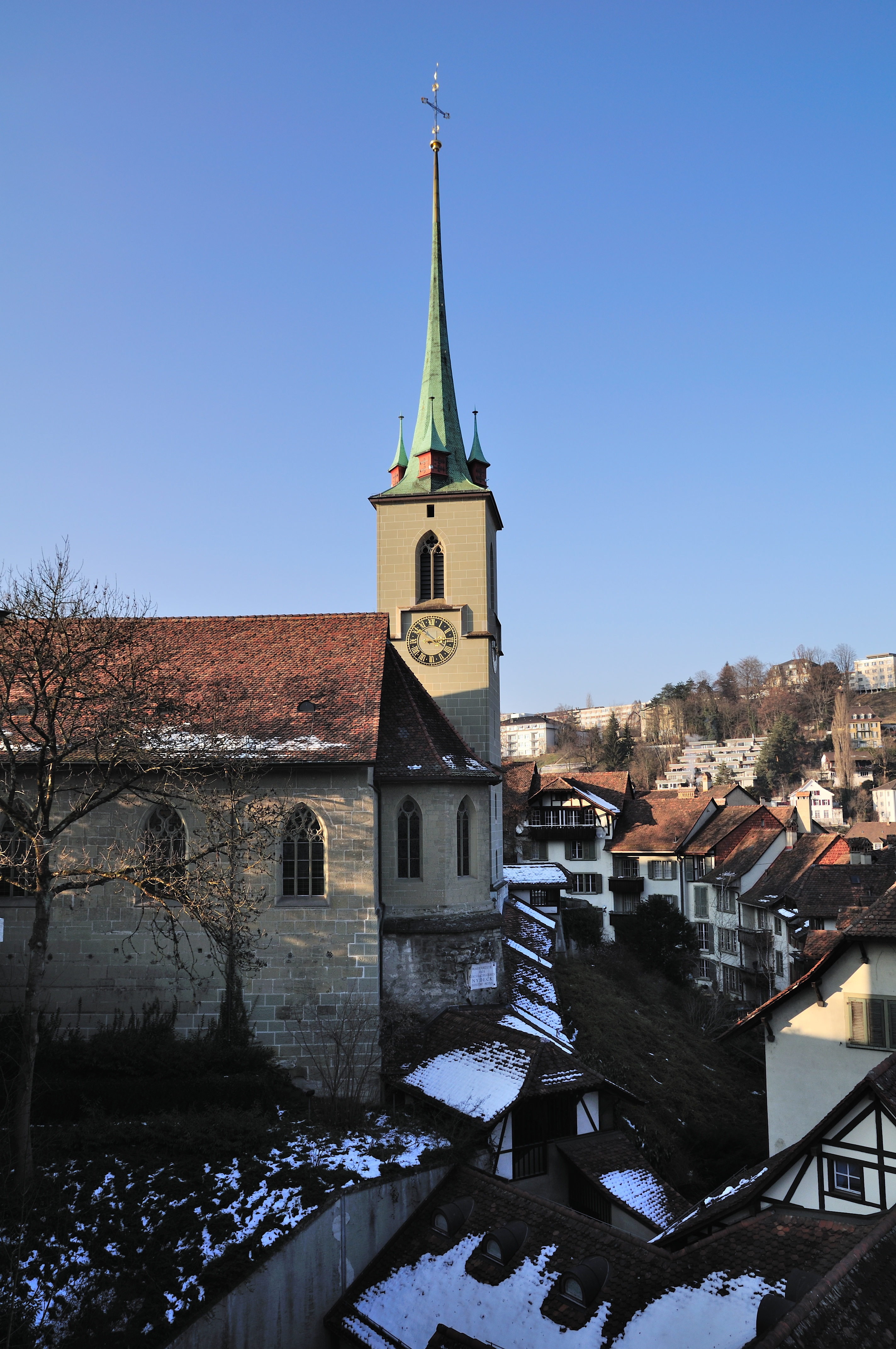 Nydeggkirche in Bern